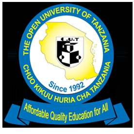 Kiswahili: Nembo ya Chuo Kikuu Huria cha Tanzania